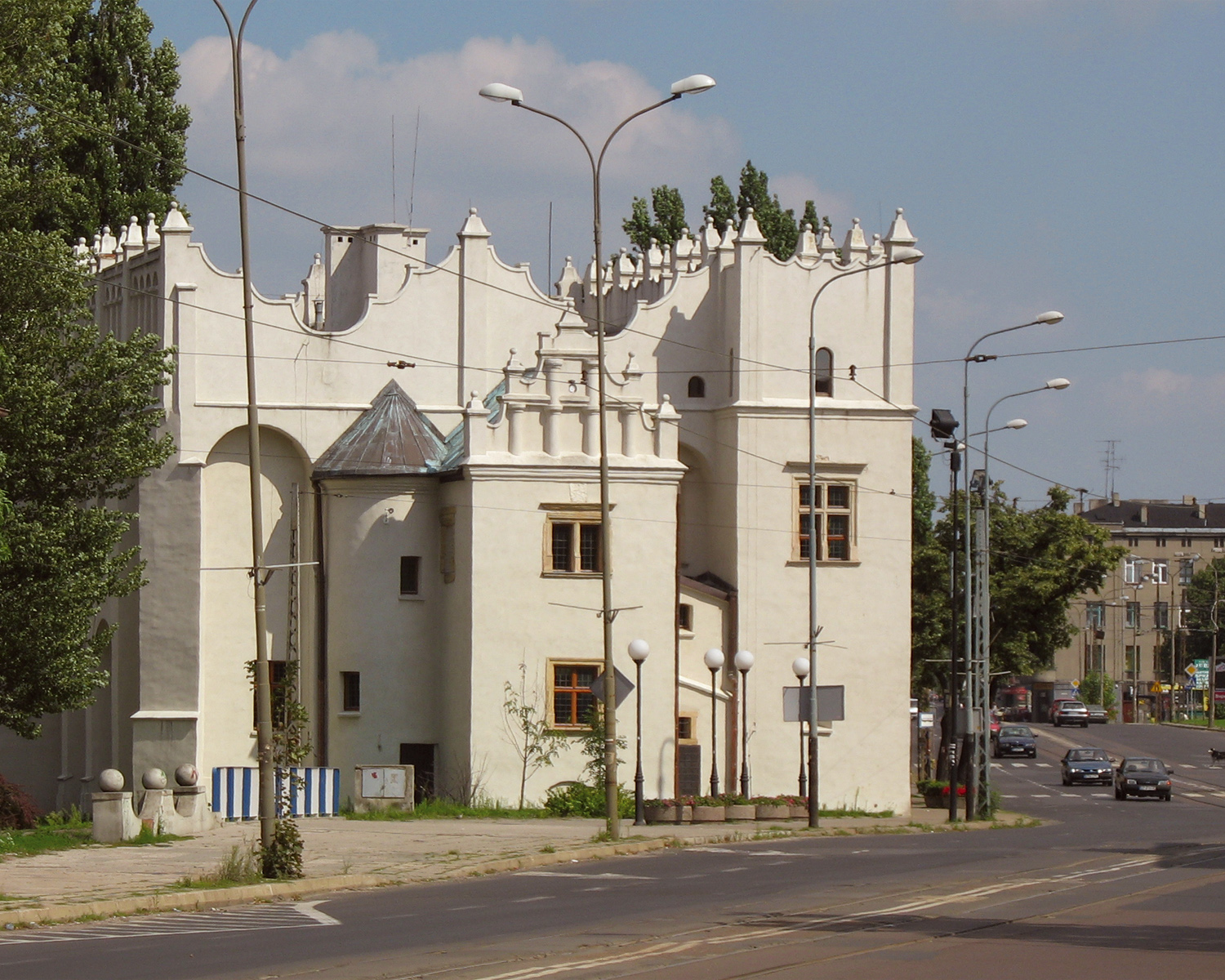 Zamek kapituły krakowskiej w Pabianicach